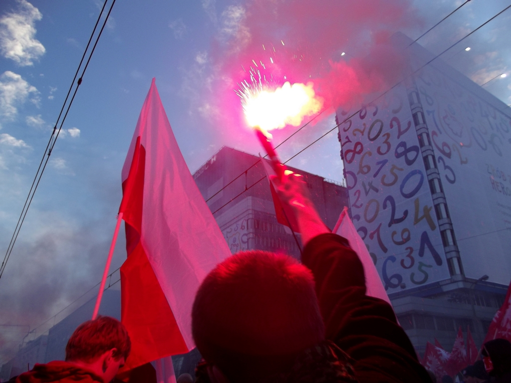 Zdjęcie zrobione podczas Marszu Niepodległości 2013, w centrum Warszawy.